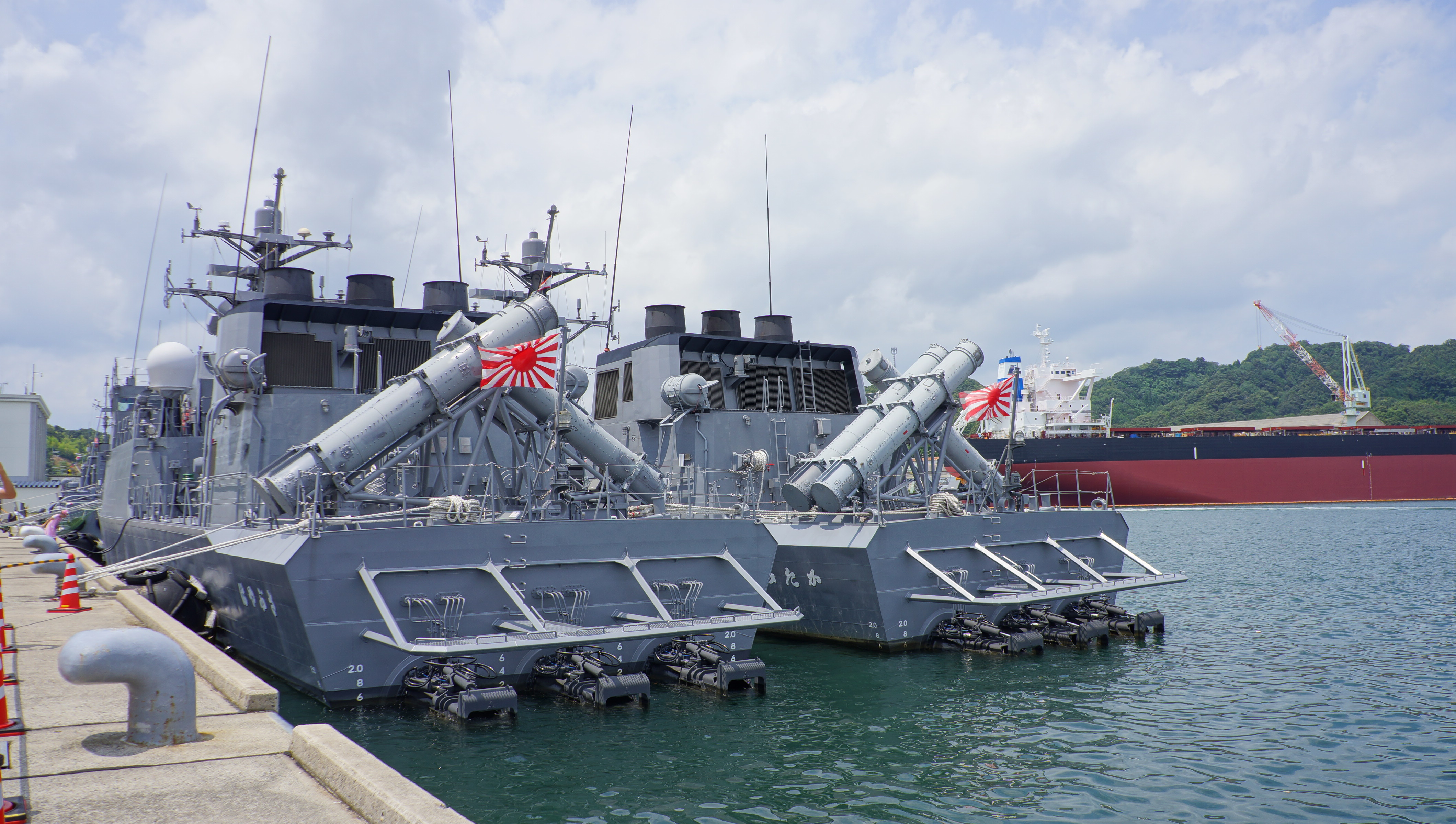 海上自衛隊 ミサイル艇はやぶさ（PG-824）及びうみたか（PG-828） 後ろ。 14年7月27日 舞鶴基地にて。